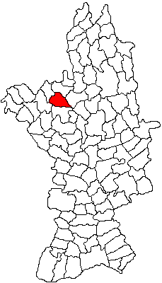 Categorie:Hărţi ale judeţului Olt